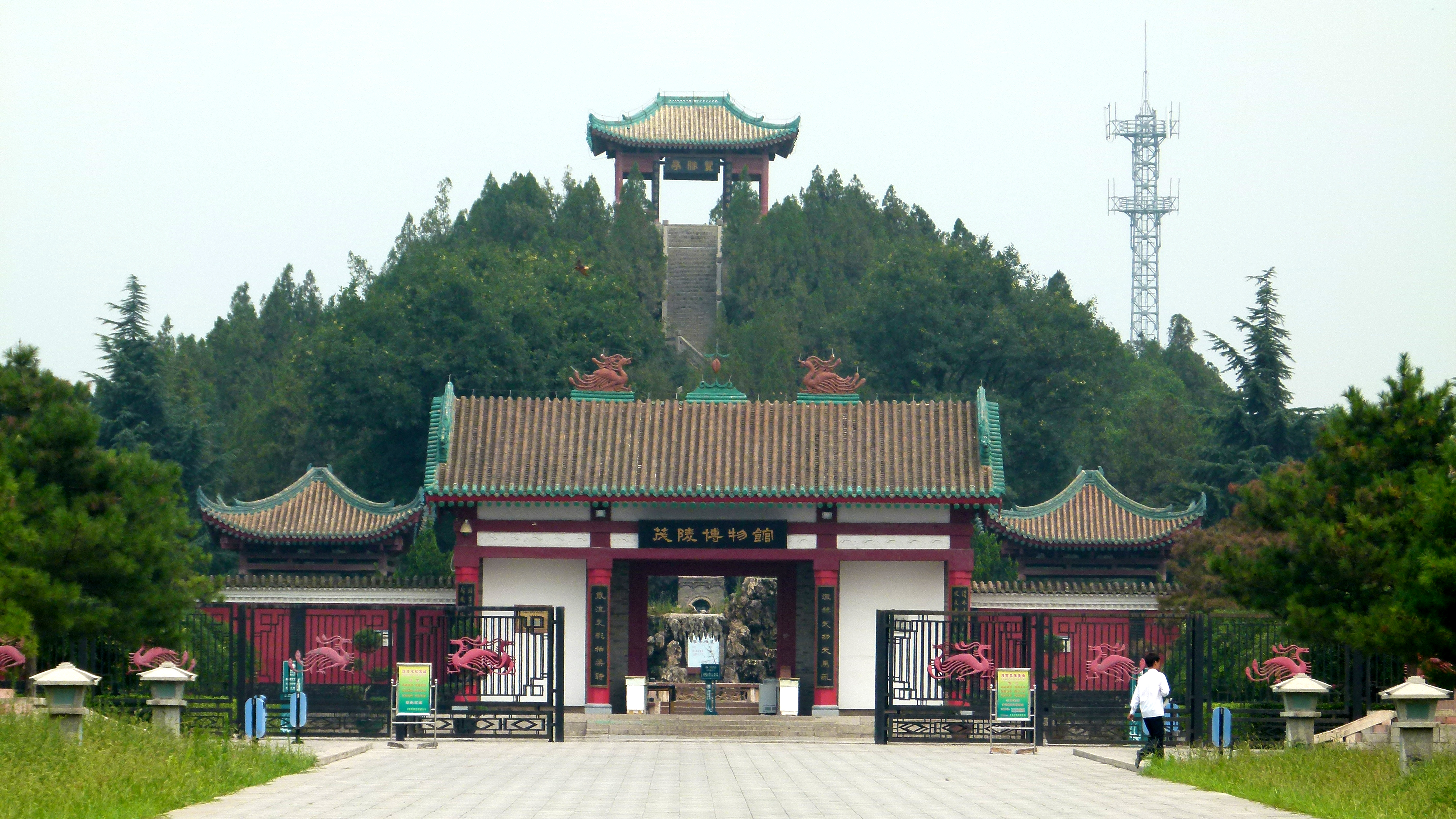 Grab von Huo Qubing im Rahmen des Mausoleums Maoling in der Nähe von Xi'an